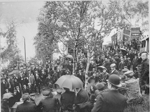 Den første streiken i Sulitjelma i juli 1911. 1911 SG.F.10009-2138